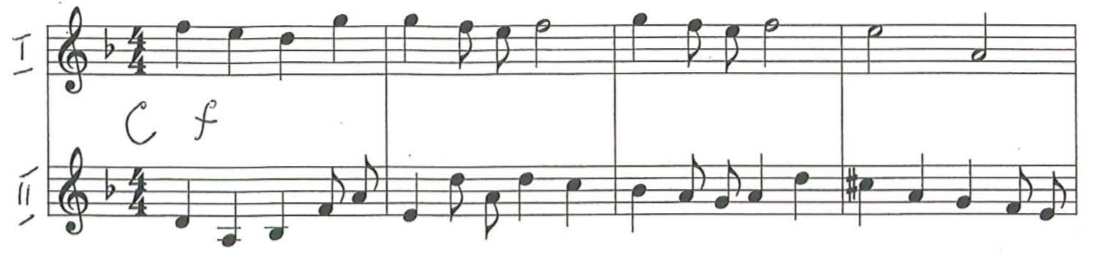 Hejnał Skwierzyny skomponowany przez Wiesława Markowskiego. Fragment partyturki.